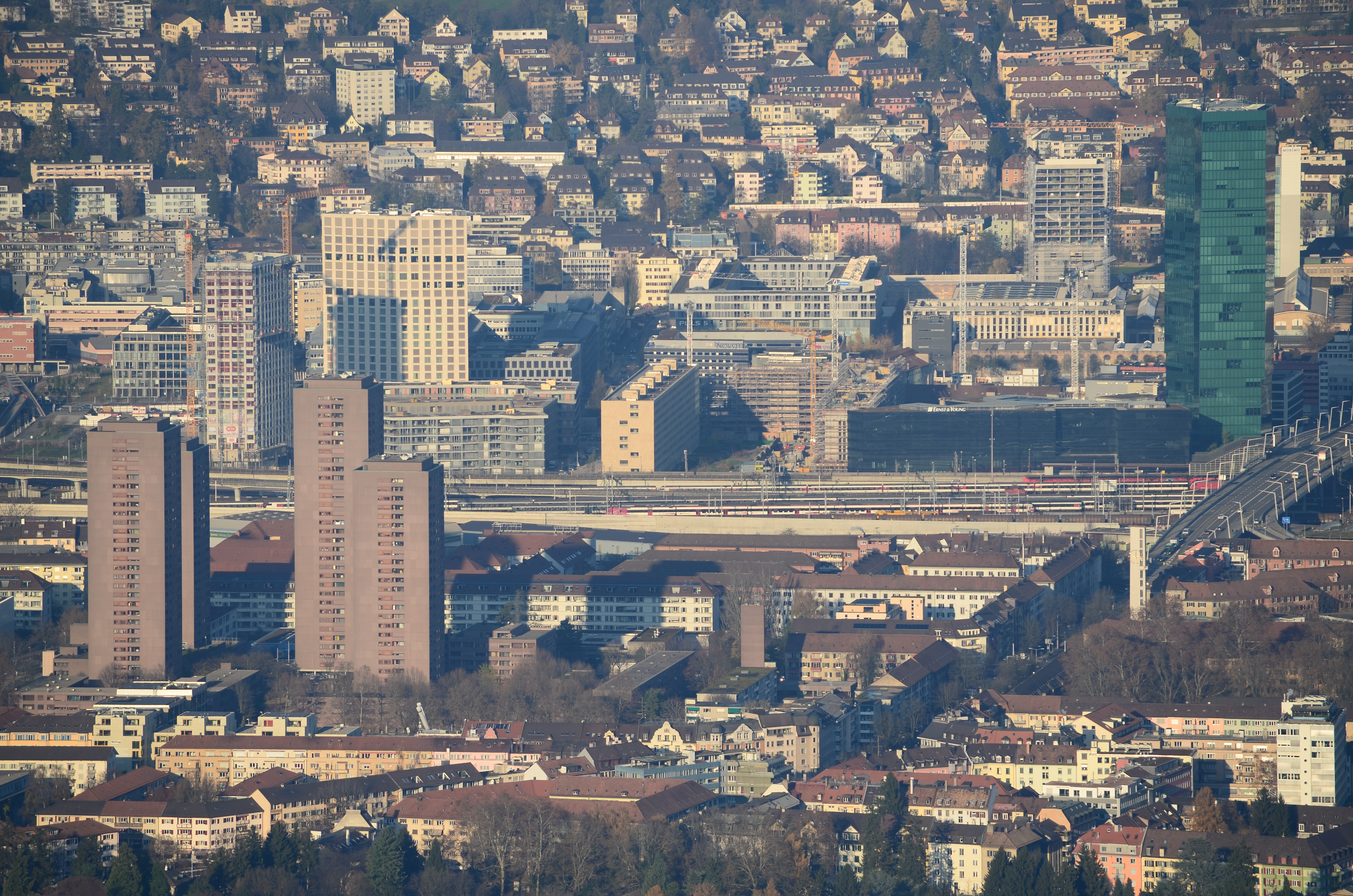 Hard, Ansicht vom Uetliberg